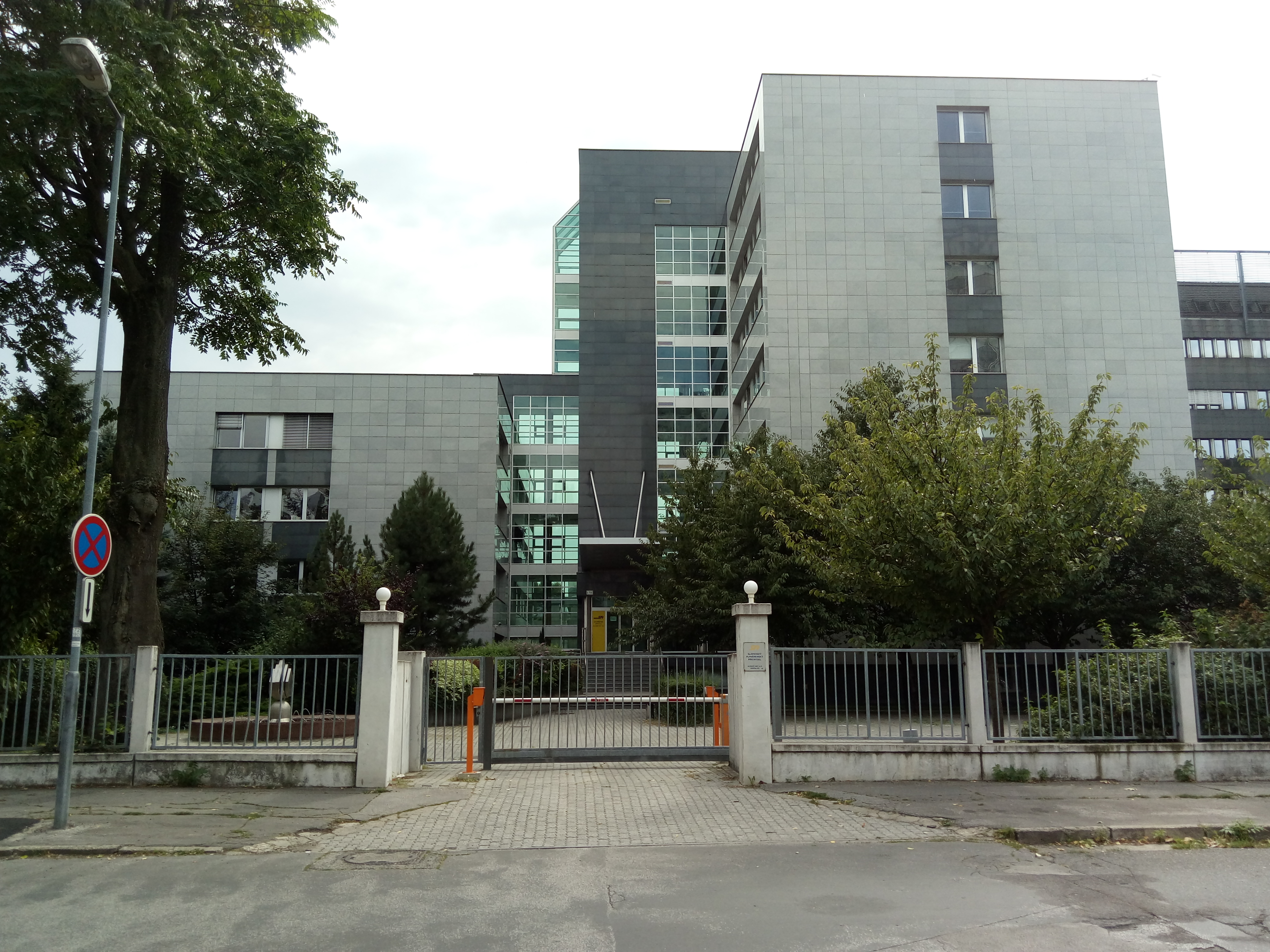 Mlynské nivy 44/b, Ružinov, Bratislava